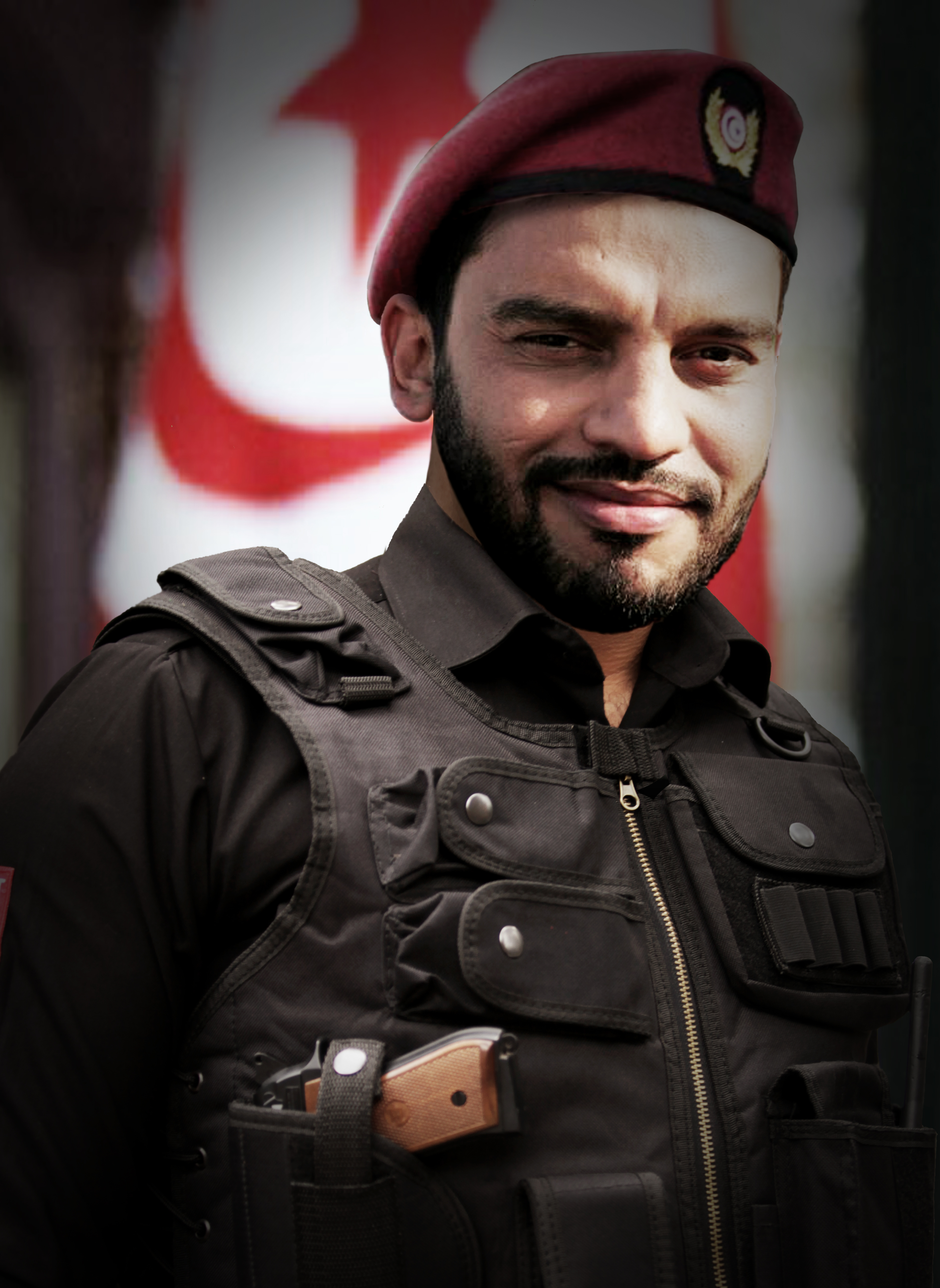 Photo de balti en costume de BAT